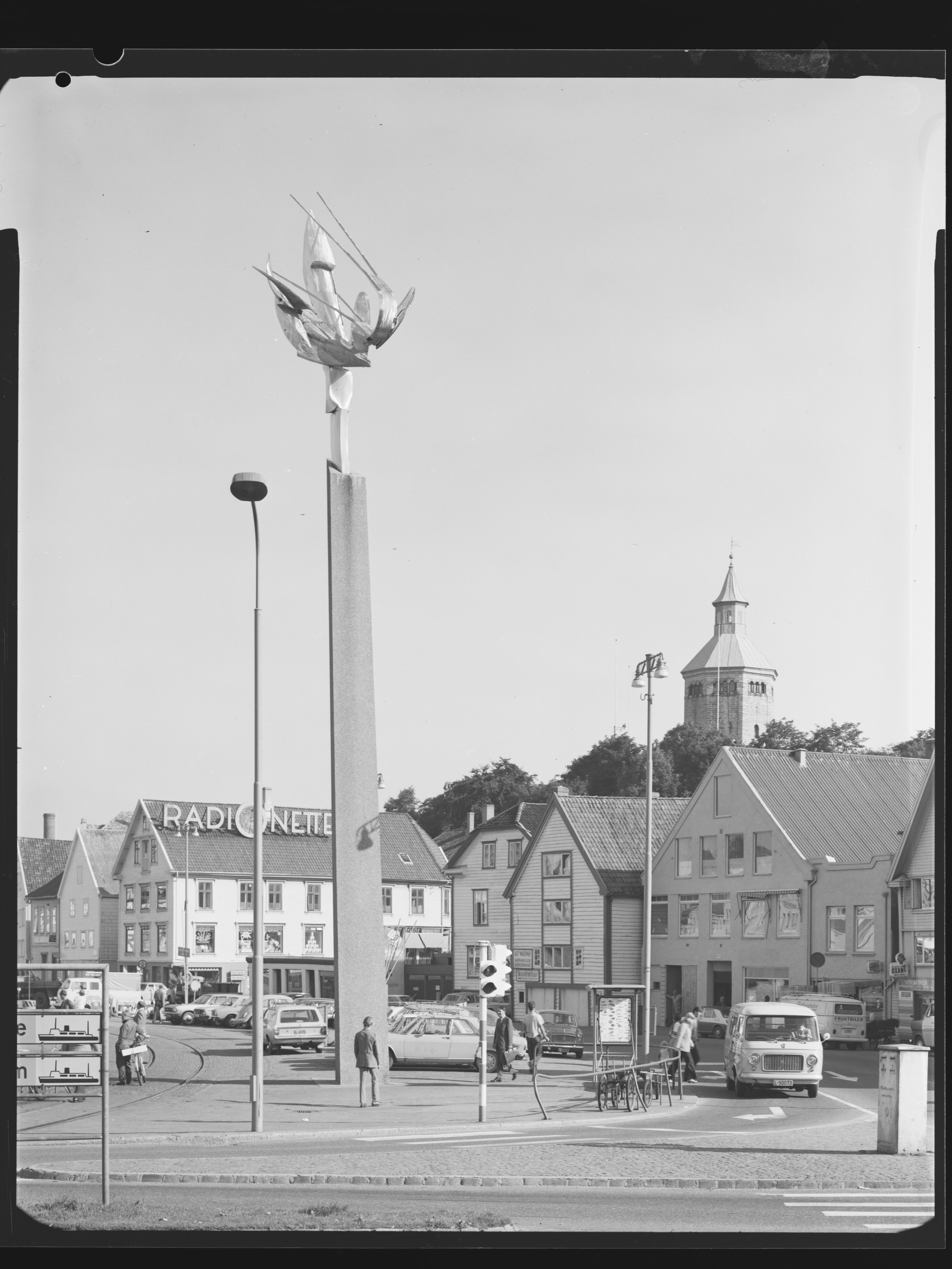 Bildet er hentet fra Nasjonalbibliotekets bildesamling Stavanger, Stavanger, Rogaland